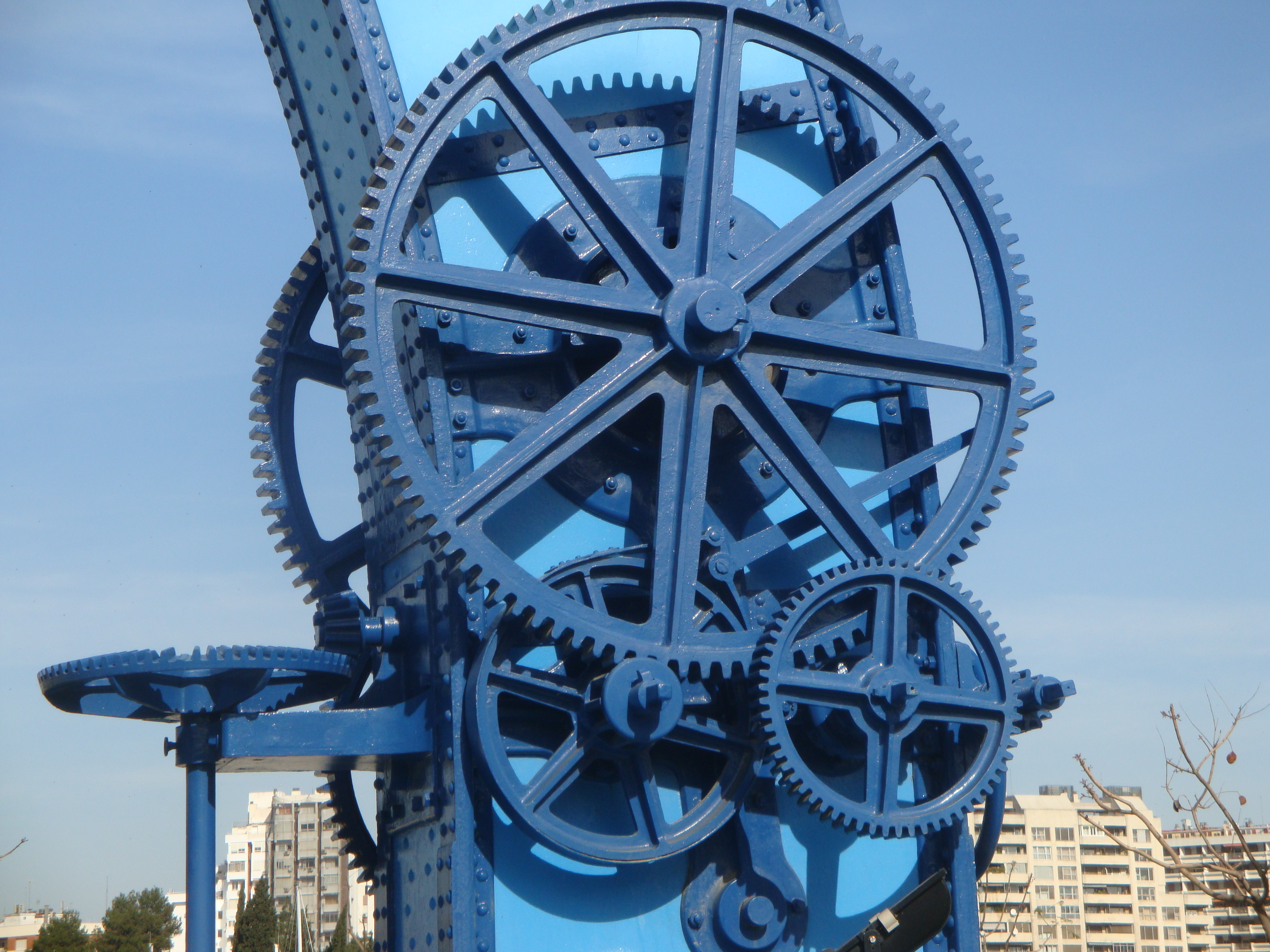 Engranajes reductores de una antigua grúa en el puerto de Sevilla